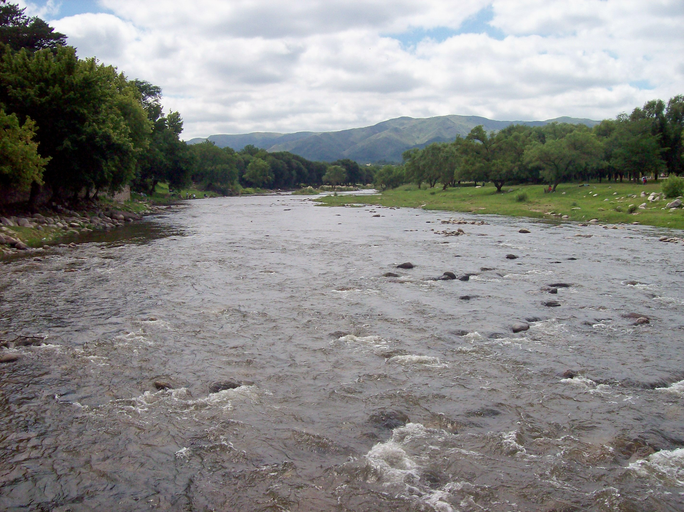 Vista al NE del Río Cosquín, en la ciudad homónima, en la provincia de Córdoba, Argentina